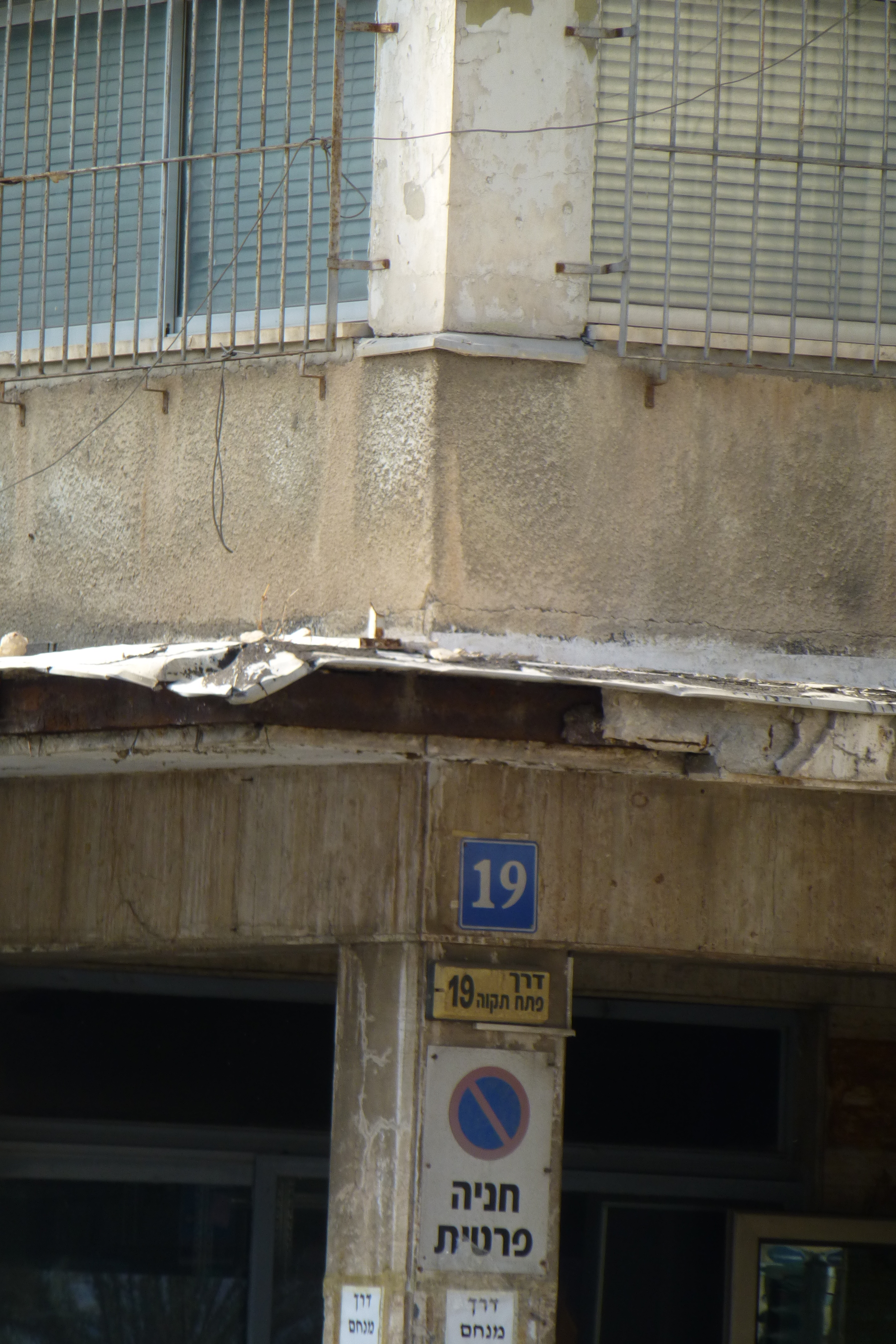 בית הדר הוא בניין המשרדים הראשון שנבנה בתל אביב. הבניין תוכנן ב-1934 על ידי האדריכל קרל רובין והוקם בין השנים 1936 ו-1938. מבנה זה הוא גם הבניין הראשון שנבנה כשלד פלדה, סוג בנייה נדיר יחסית בארץ.